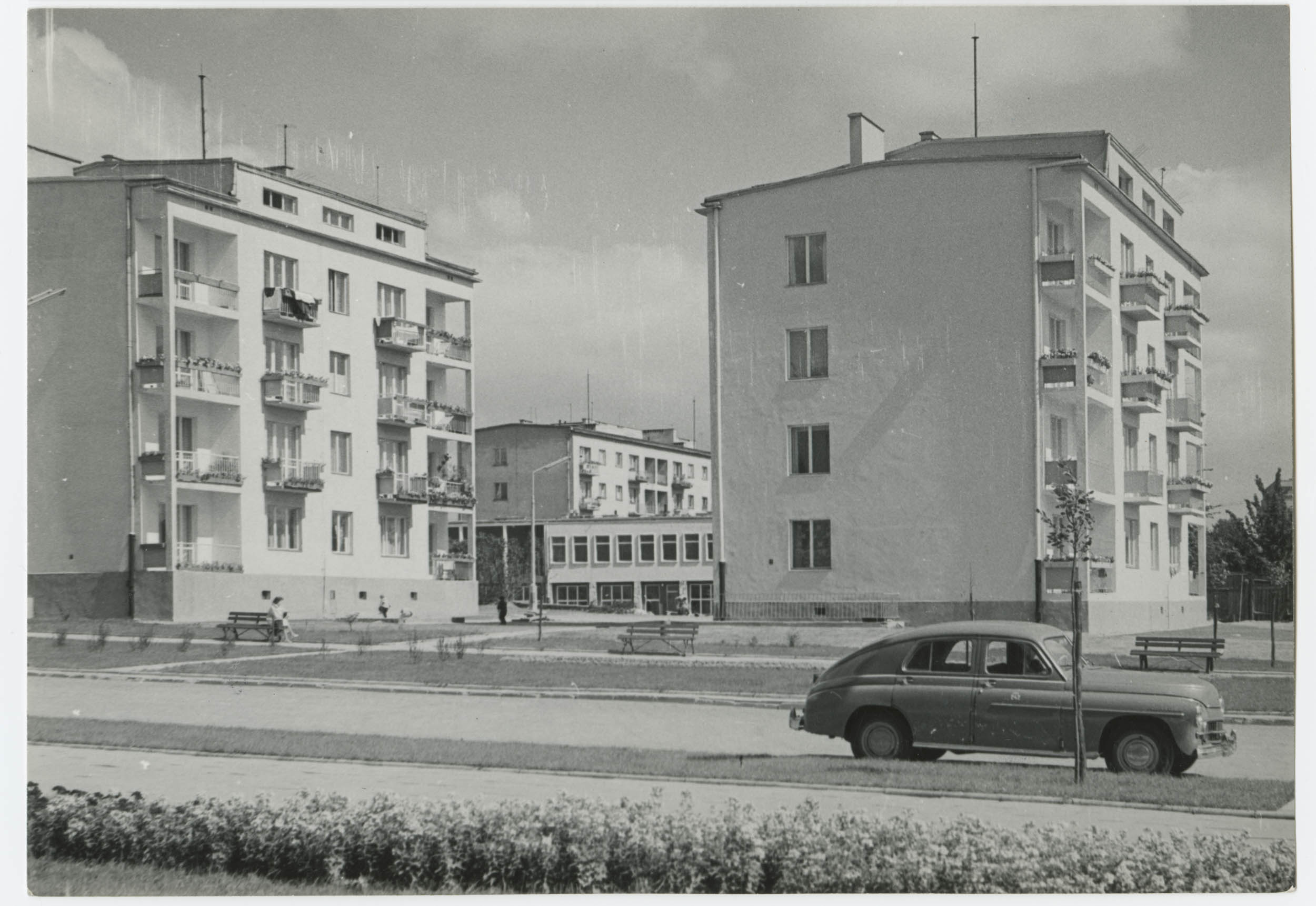 Fotografia przedstawia budynki mieszkalne znajdujących się na osiedlu im. Włady Bytomskiej oraz zaparkowany przy ulicy samochód marki Warszawa M-20. Osiedle to wybudowano na Bałutach w latach 50. XX wieku, w kwartale dzisiejszych ulic: Wojska Polskiego, Obrońców Westerplatte, M. Tokarzewskiego i Franciszkańskiej. Zaprojektowane zostało przez łódzkich architektów Bolesława Tatarkiewicza i Romualda Furmanka. Budynki przy głównych ulicach mają reprezentacyjną formę, natomiast zabudowa w środku kwartałów przybrała formę wolno stojących bloków. Zgodnie z postulatem kompleksowości w zaspokajaniu potrzeb mieszkańców zabudowę mieszkaniową dopełniały obiekty usługowe i użyteczności publicznej: szkoły, przedszkola, żłobki przychodnia lekarska, biblioteka itp.